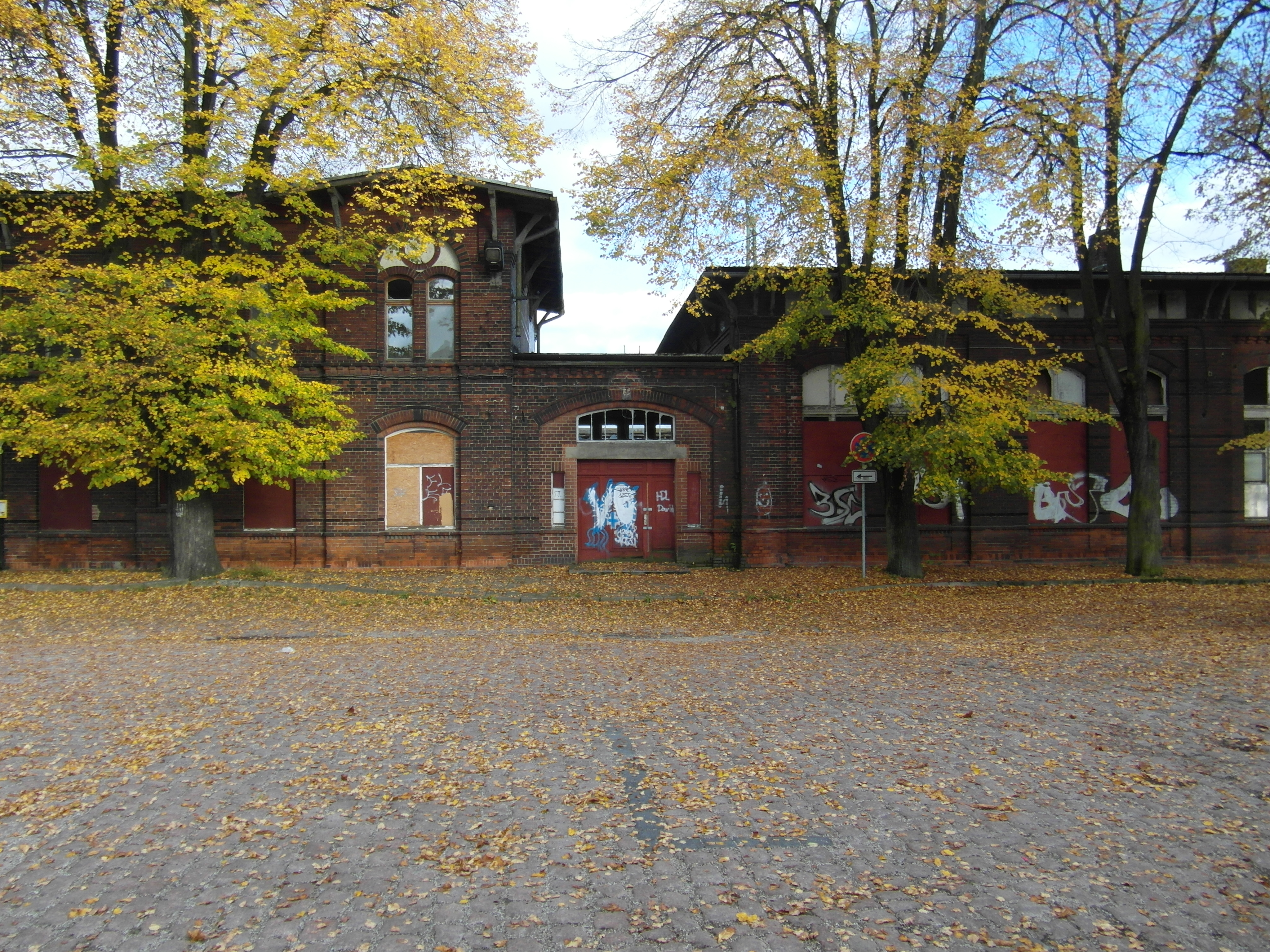 Im Salzlandkreis in Sachsen-Anhalt